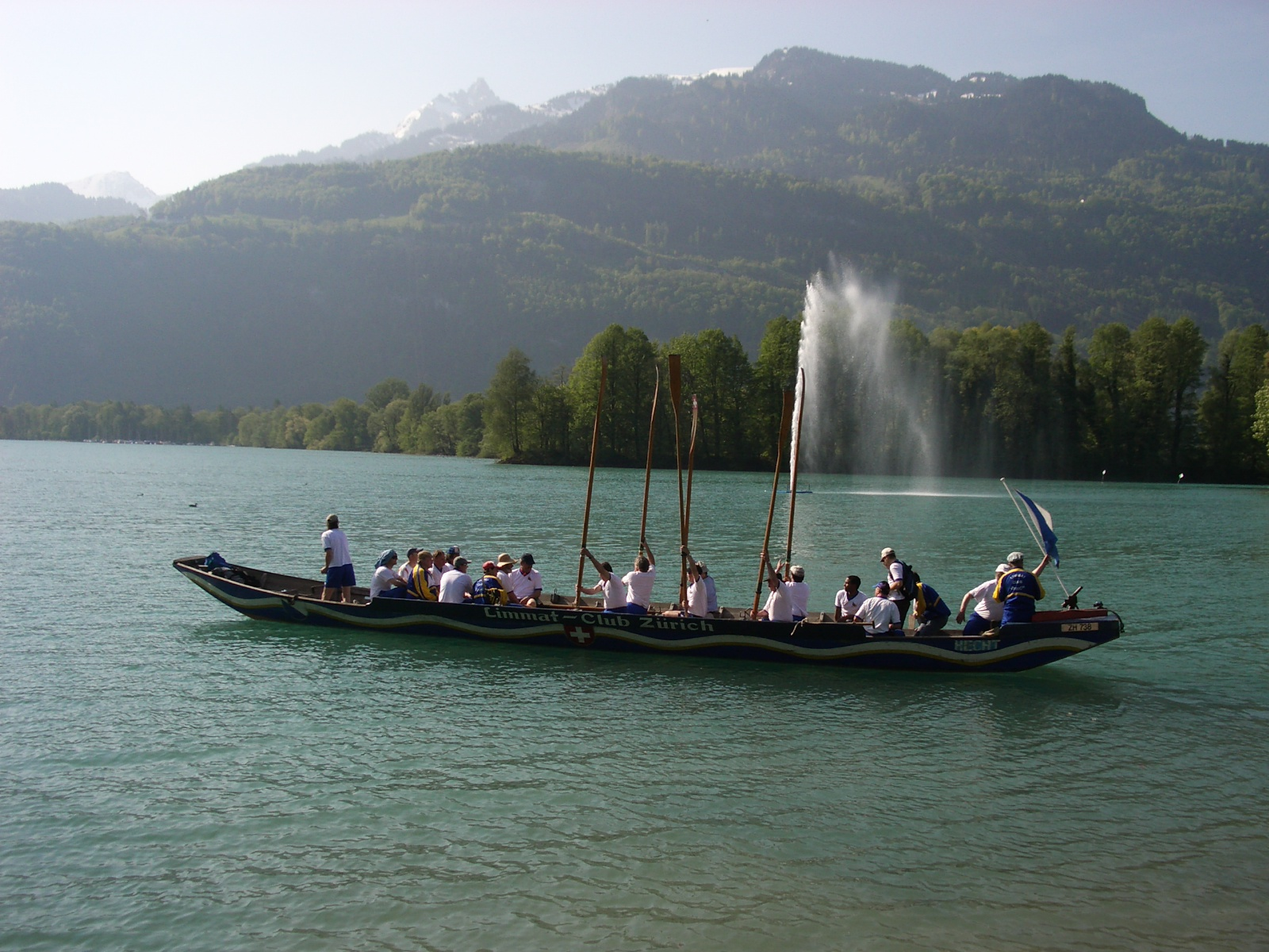 Limmatclub ZH, Switzerland